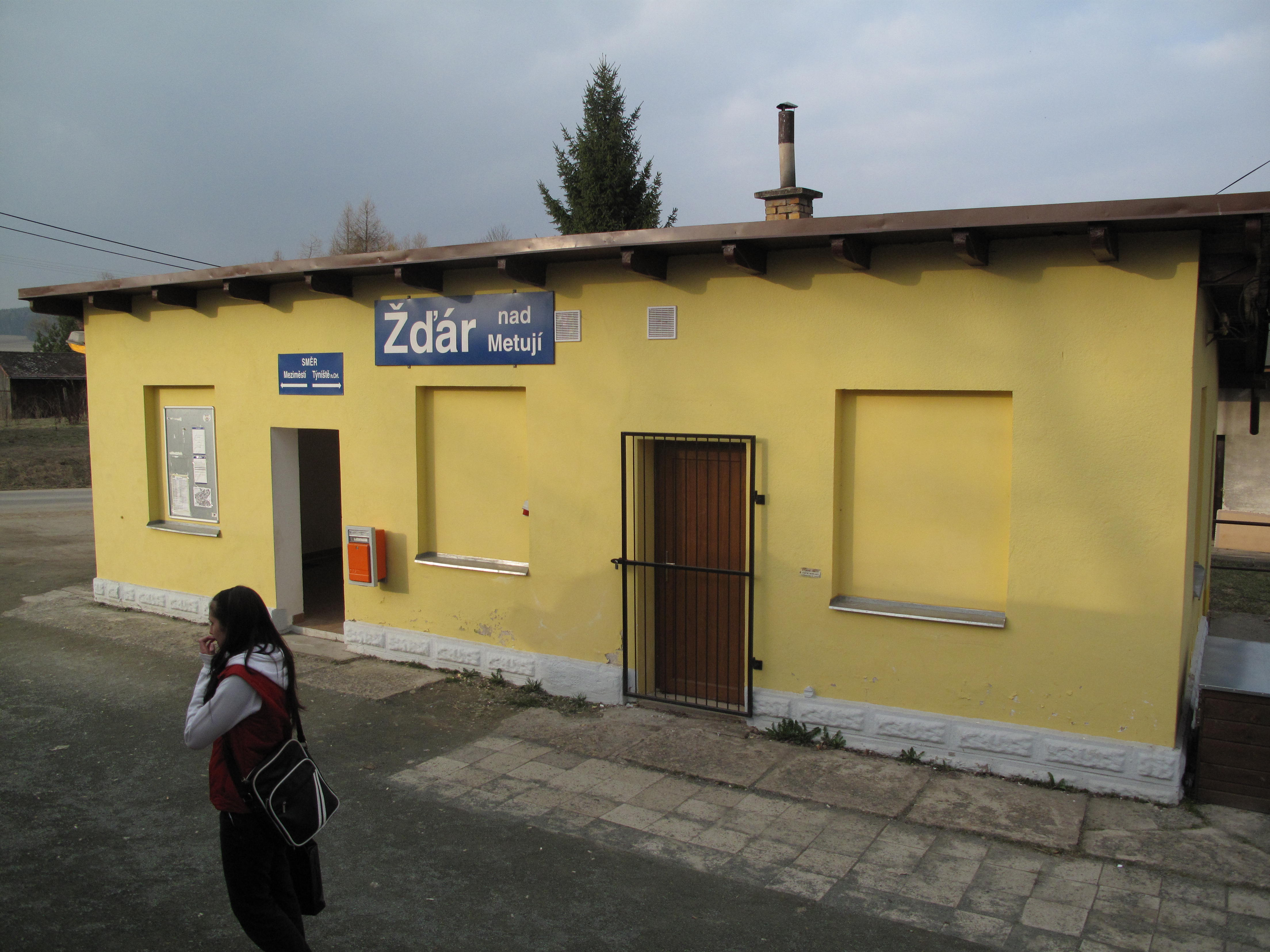 Žďár nad Metují, železniční stanice